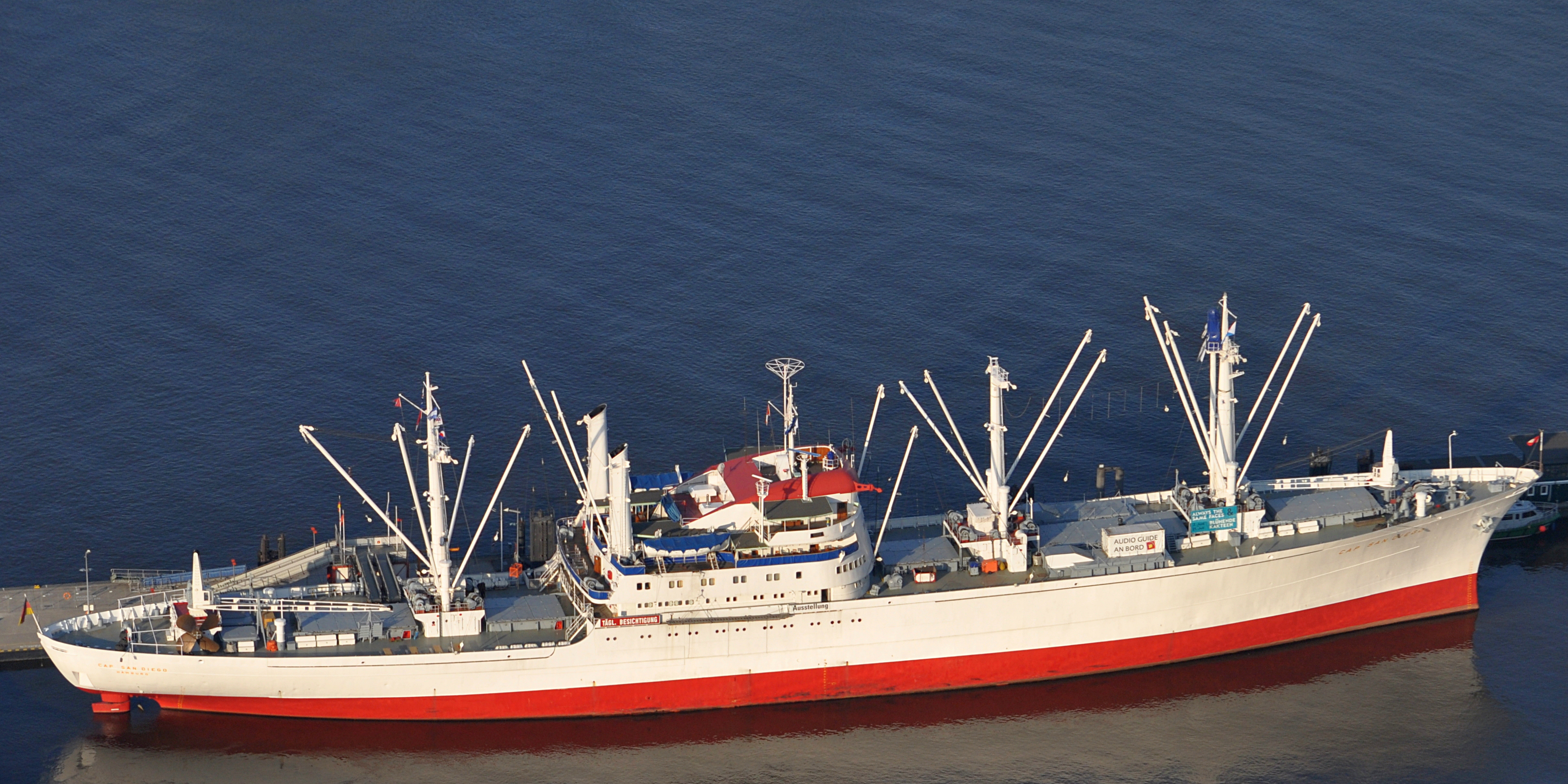 Museumsschiff Cap San Diego im Hamburger Hafen. This is a photograph of an architectural monument.